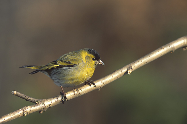 Carduelis spinus